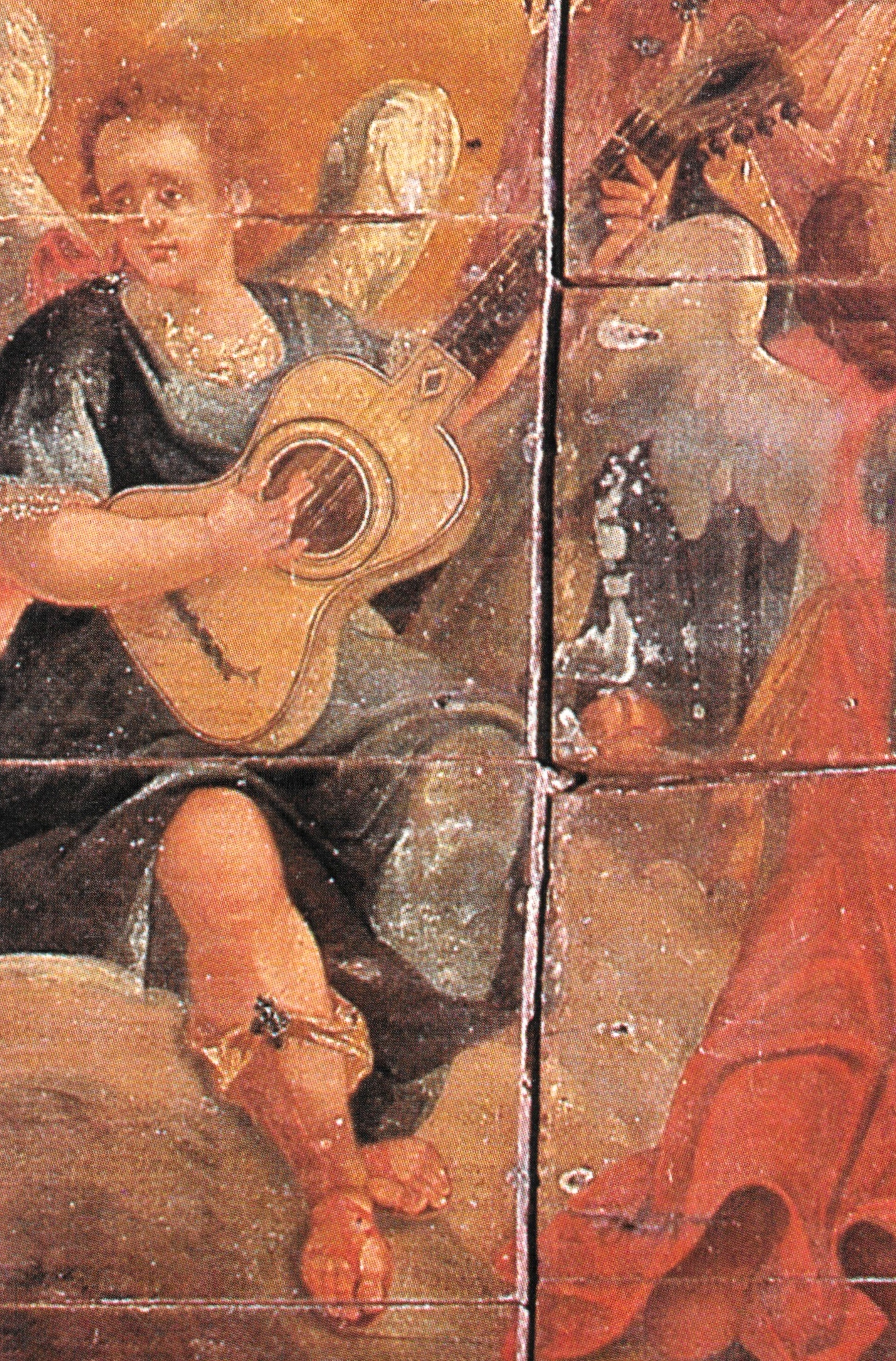 Anjo tocando viola pintada, no teto da sacristia do Convento de Santo Antônio de Igarassu (PE).